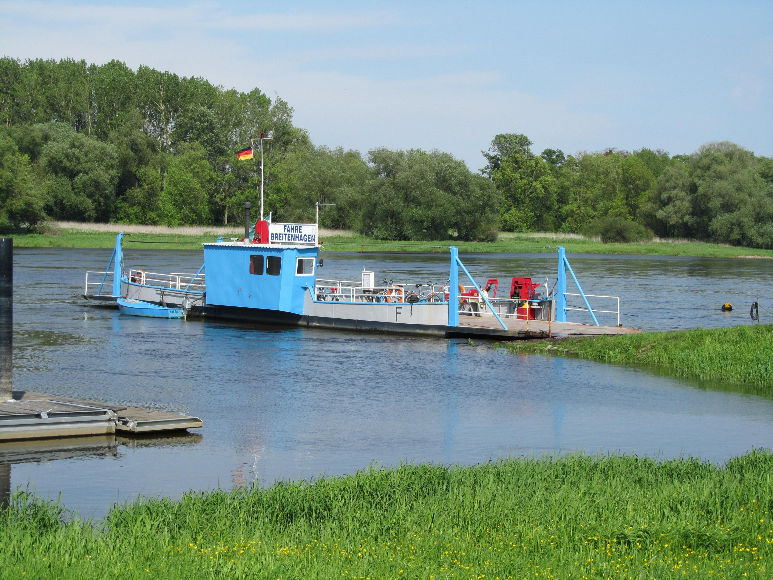 Breitenhagen, Gierseilfähre über die Elbe